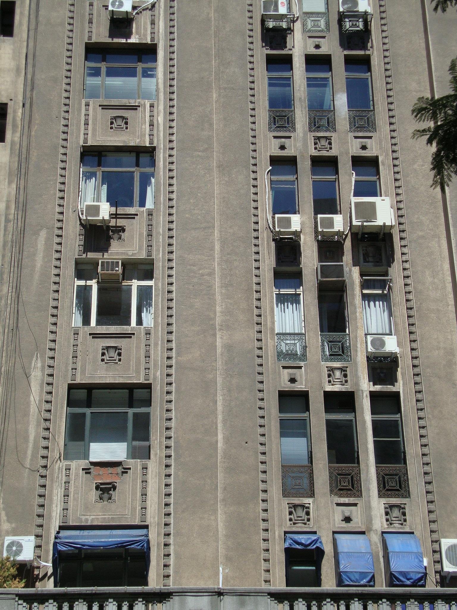 Rejas artísticas de las ventanas y relieves en la fachada del edificio de la compañía de seguros La Equitativa del Plata. Diagonal Norte, esquina Florida.